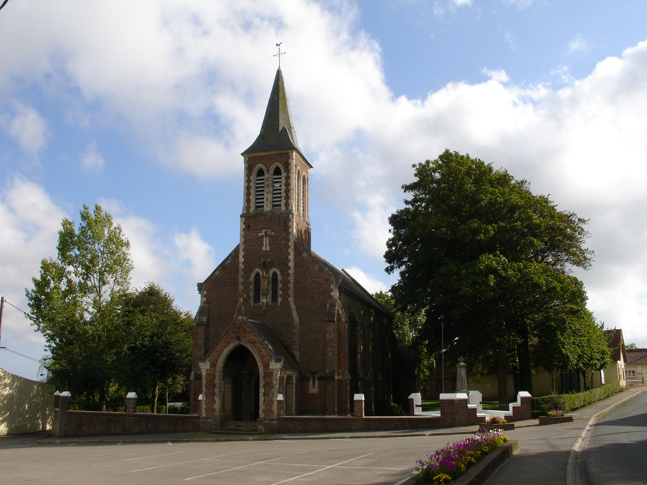 Église de Halinghen